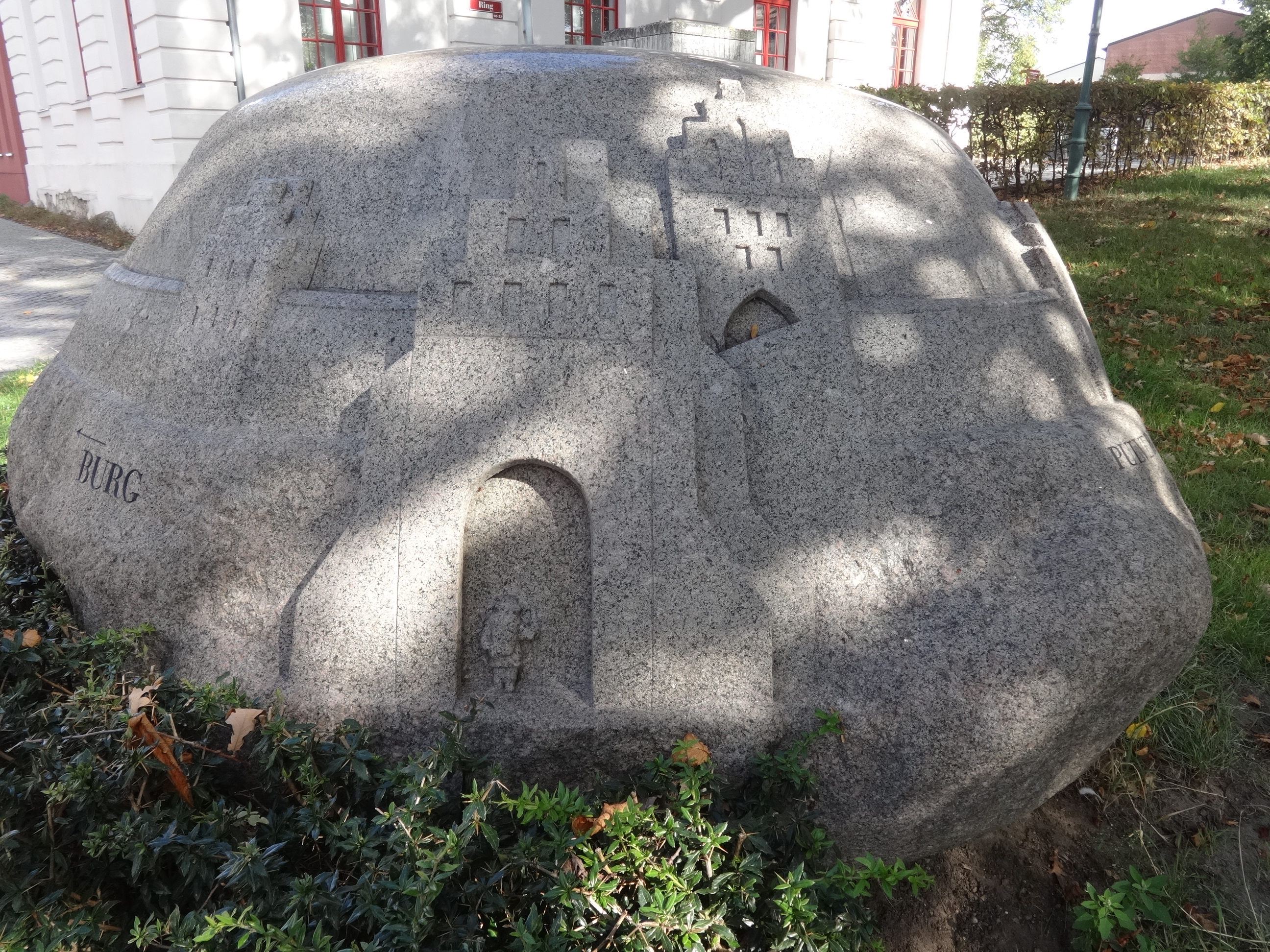 Findling mit einer Abbildung des ehemaligen mittelalterlichen Haupttores, dem Berliner Tor in Angermünde